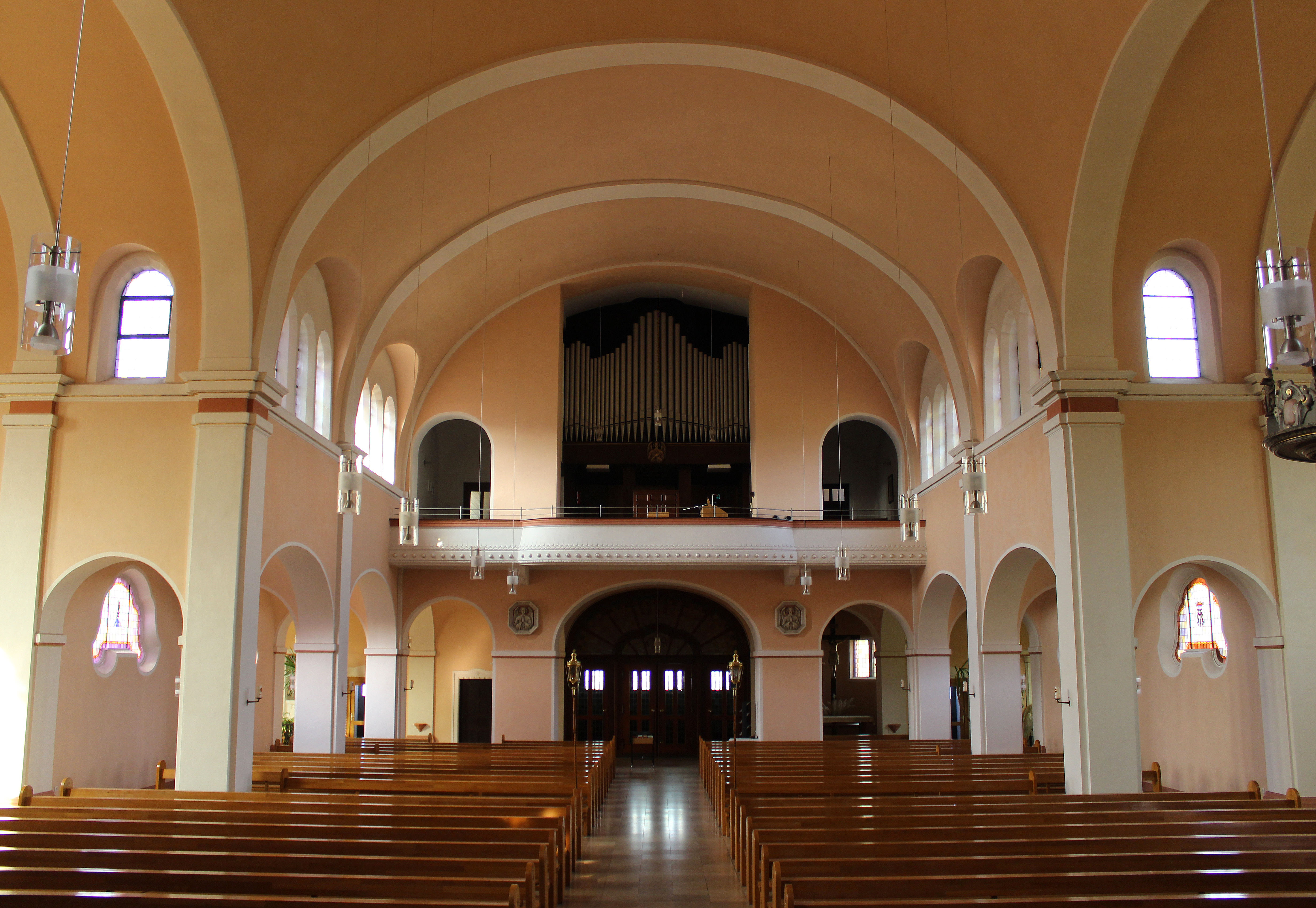 Blick is Innere der katholischen Pfarrkirche St. Mauritius in Haustadt, einem Ortsteil der Gemeinde Beckingen, Landkreis Merzig-Wadern, Saarland